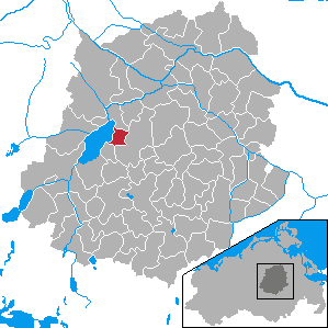 Meesiger, Landkreis Demmin, Mecklenburg-Vorpommern